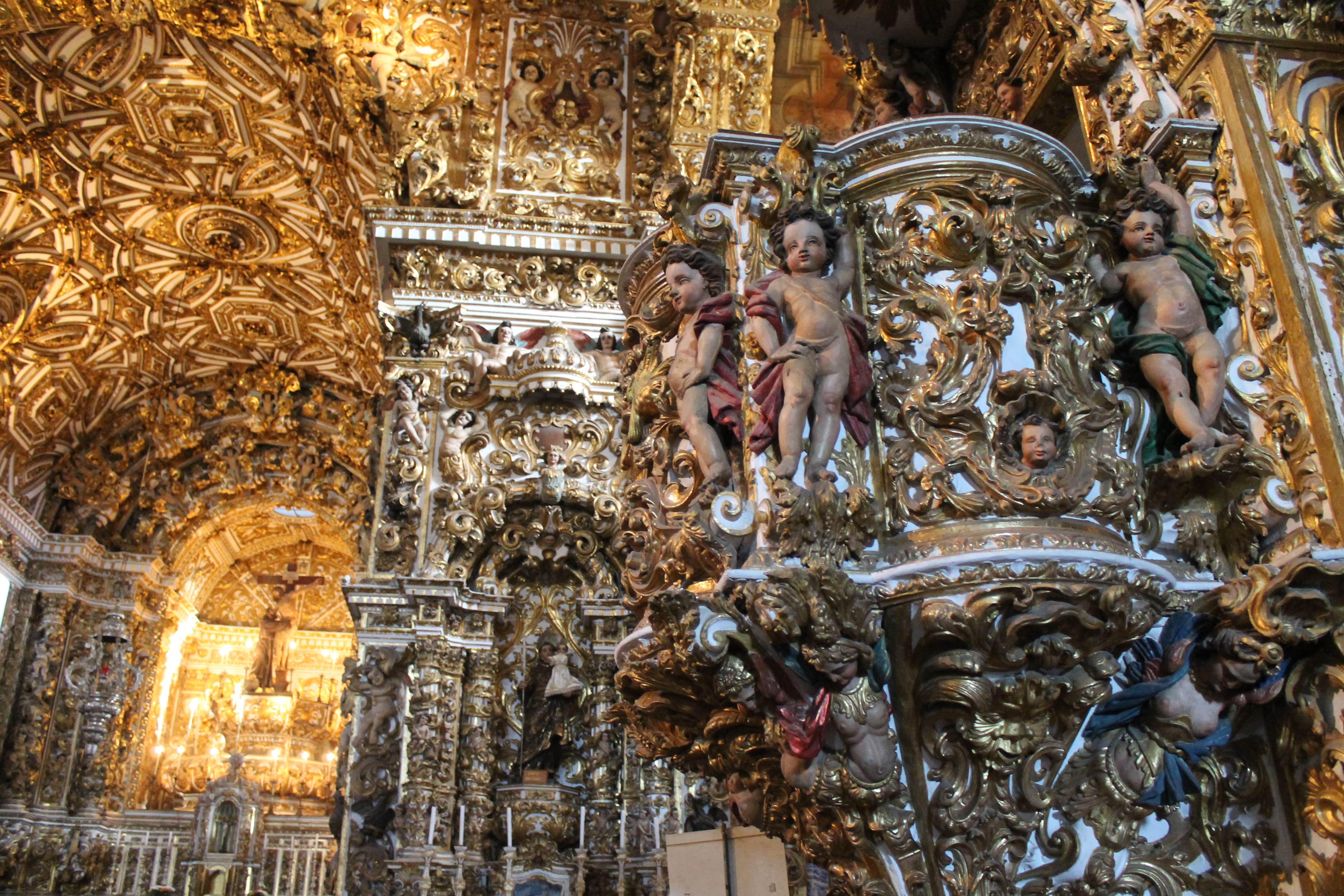 Convento e Igreja de São Francisco